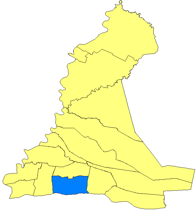 Mapa de Mayor José Martínez, Paraguay.